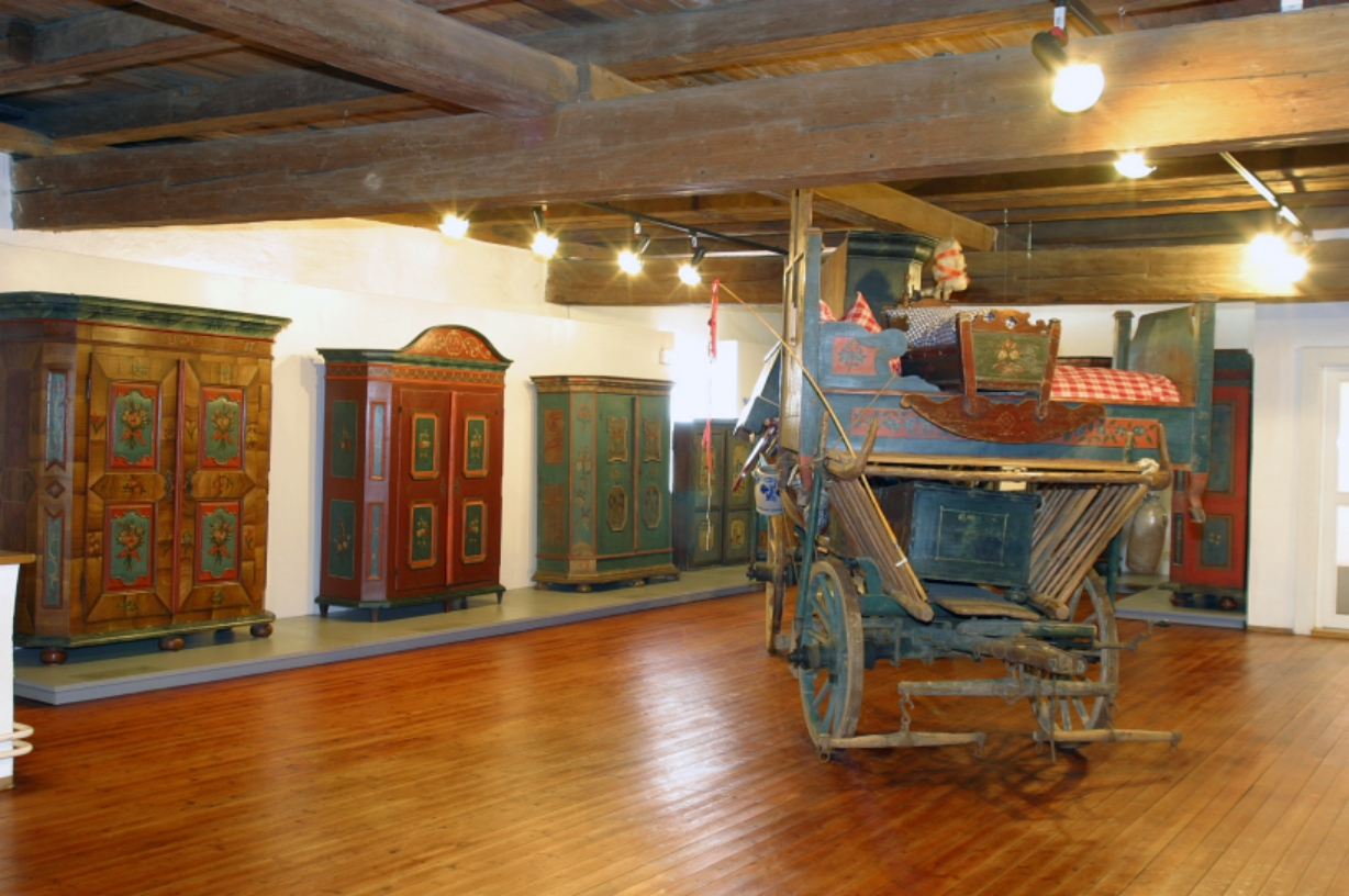 Hochzeitswagen, Dauerausstellung Fichtelgebirgsmuseum, Fichtelgebirgsmuseum 2004